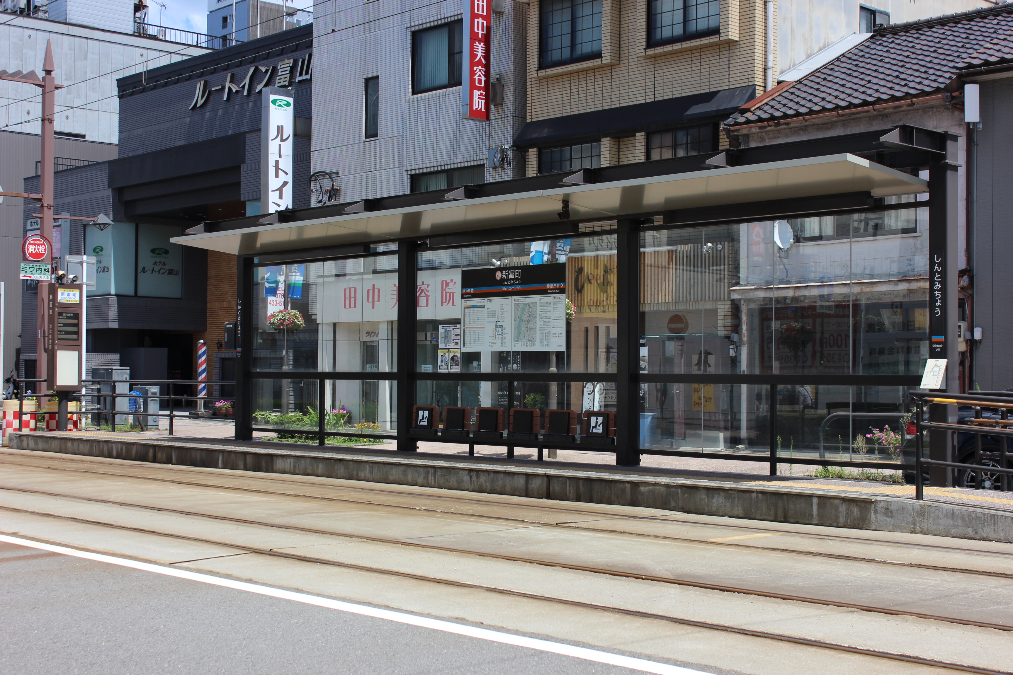 富山地方鉄道富山軌道線新富町停留場